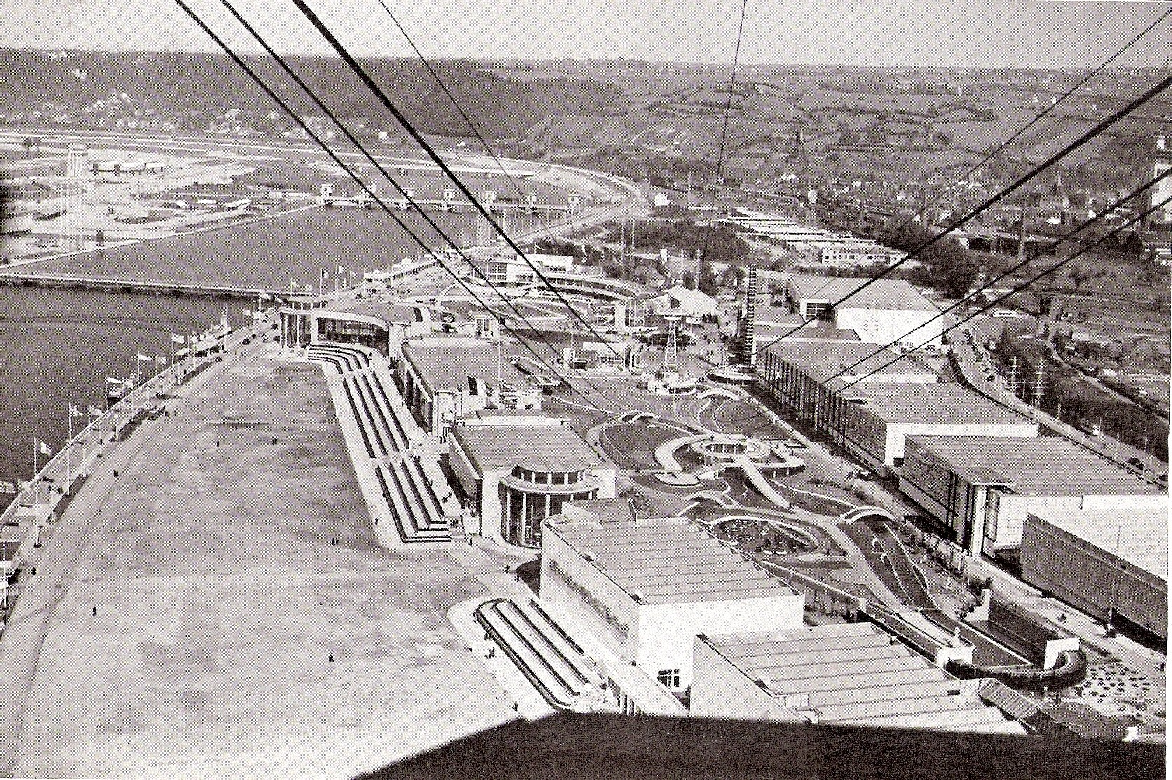 Une partie de l'Exposition internationale de Liège de 1939 vue de la cabine du téléférique. En bordure de l'esplanade, au premier plan, les palais du Génie civil et de la Navigation; plus loin, les trois pavillons jumelés de la France. Au fond, le Lido.